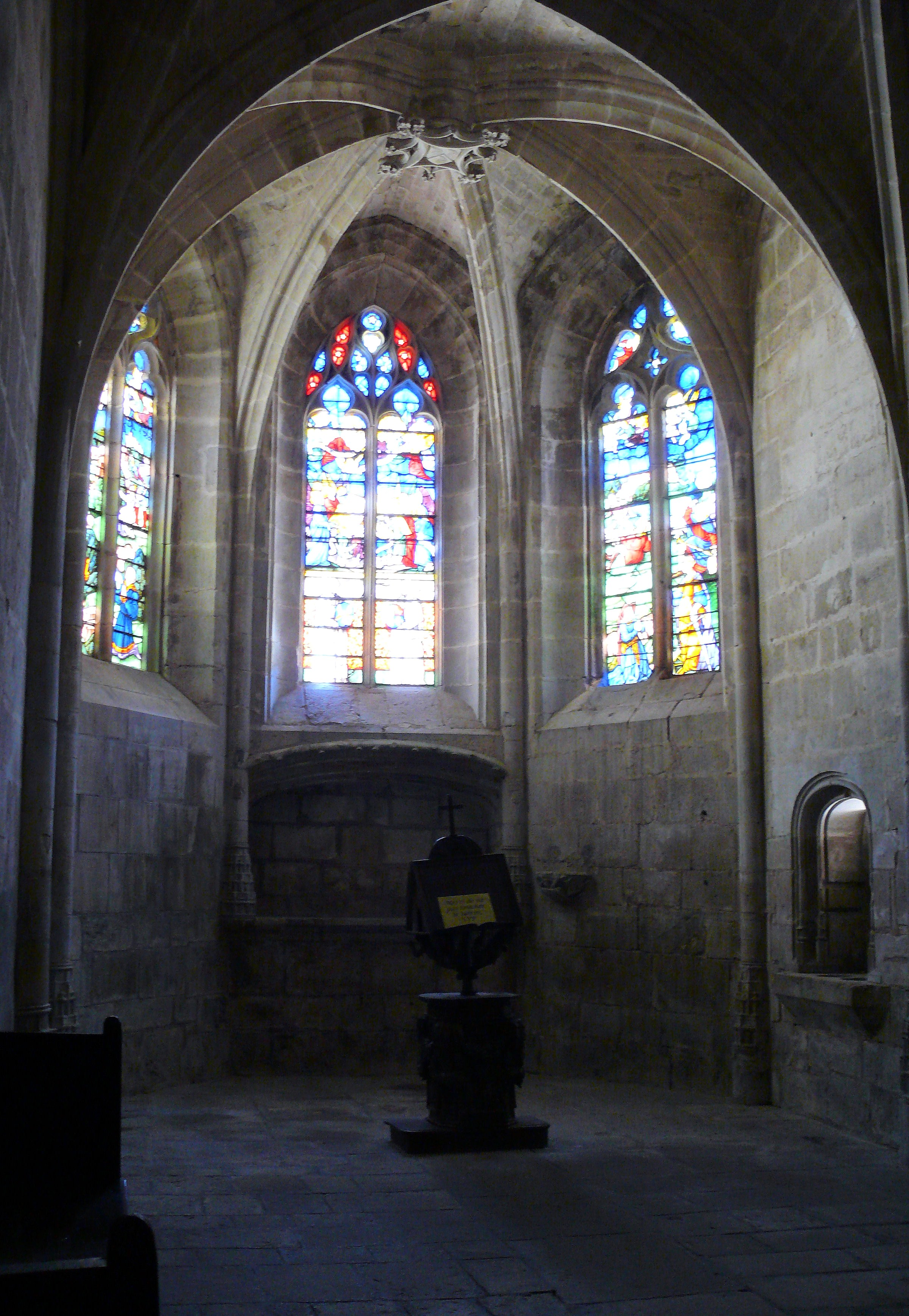 Villefranche-de-Périgord - Chartreuse Saint-Sauveur - Salle du chapitre